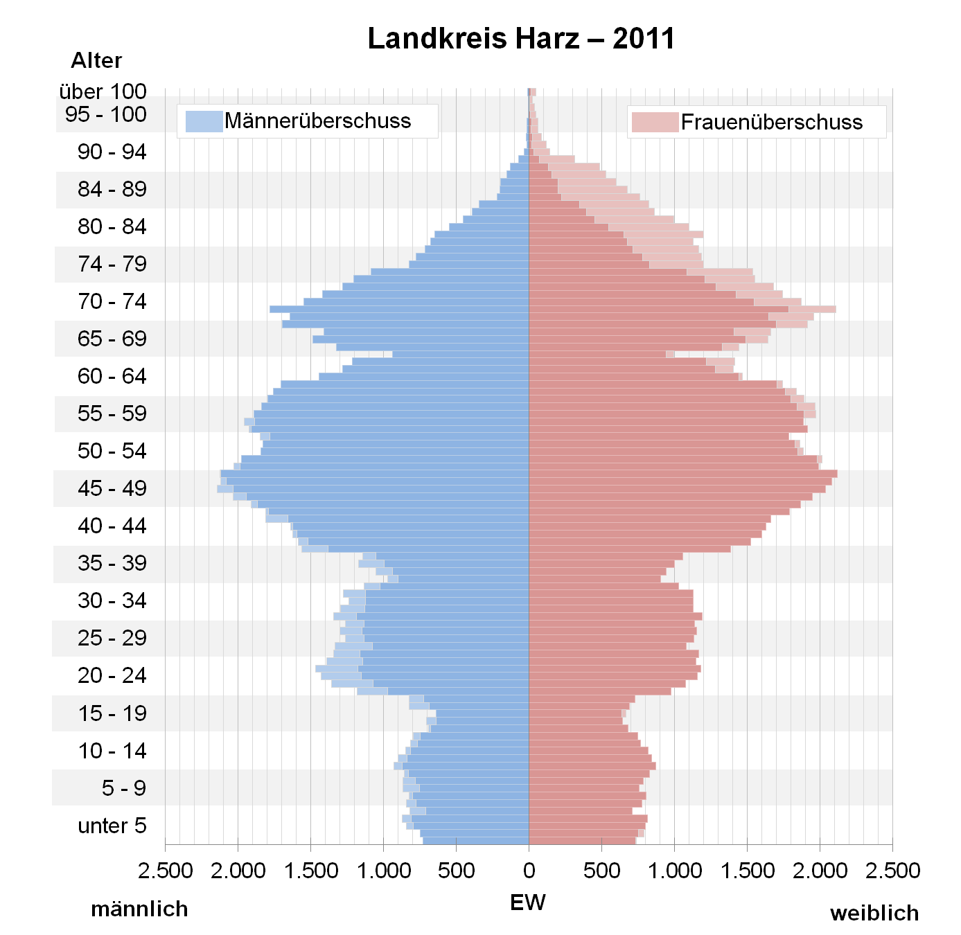 Bevölkerungspyramide des Landkreises Harz nach Zensus 2011.